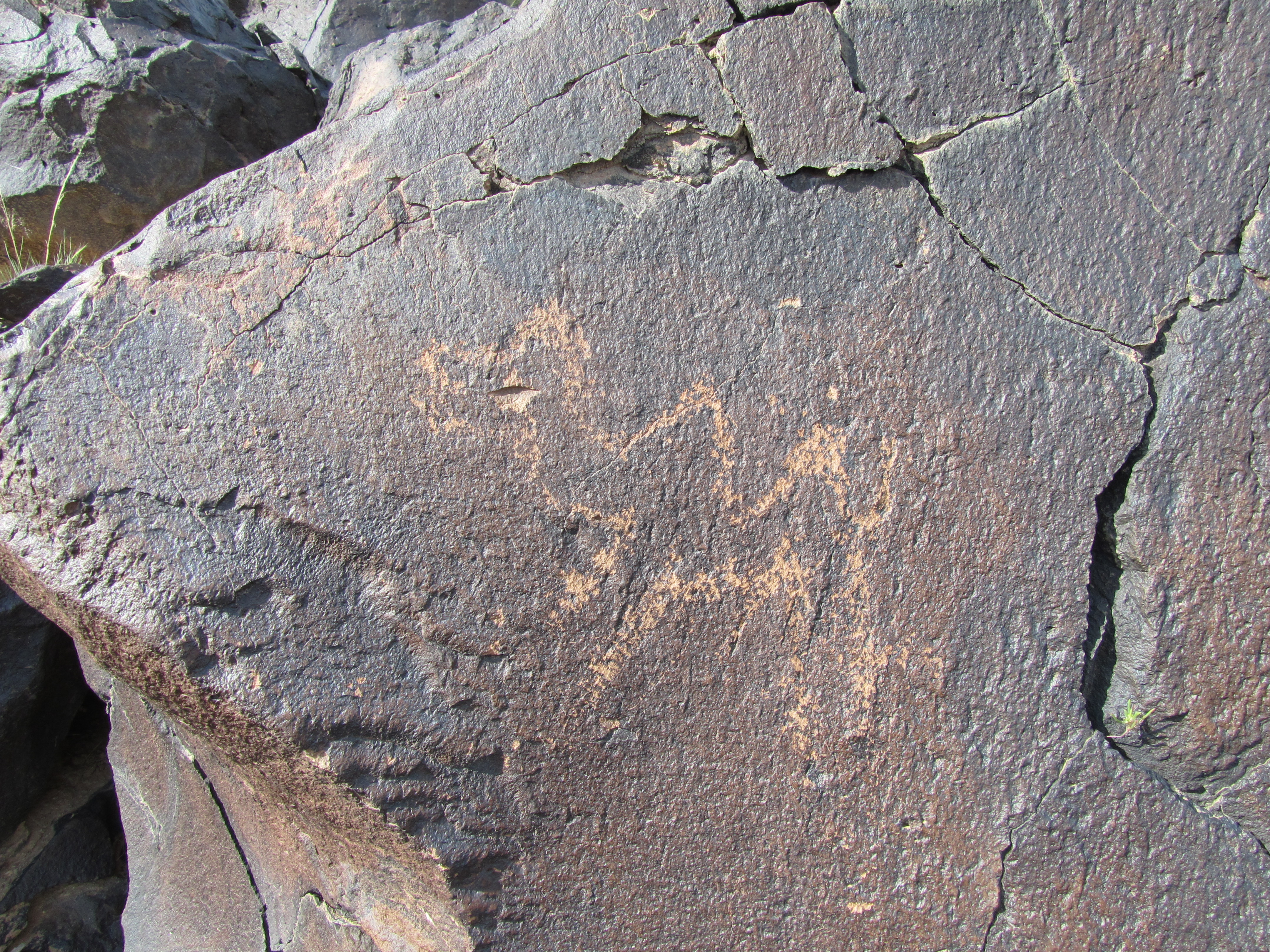 Camel